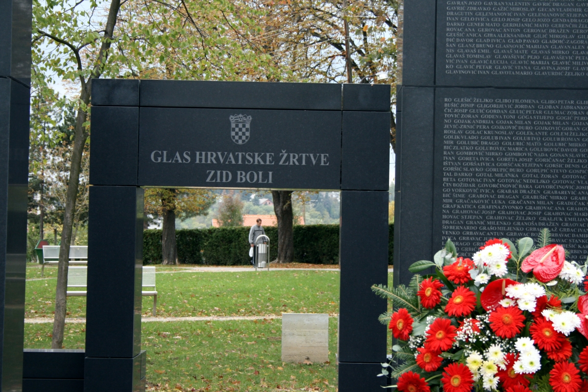 Memorijal žrtvama, nestalim i zatočenim hrvatskim braniteljima i Zid boli, autor Dušan Džamonja, Mirogoj, Zagreb